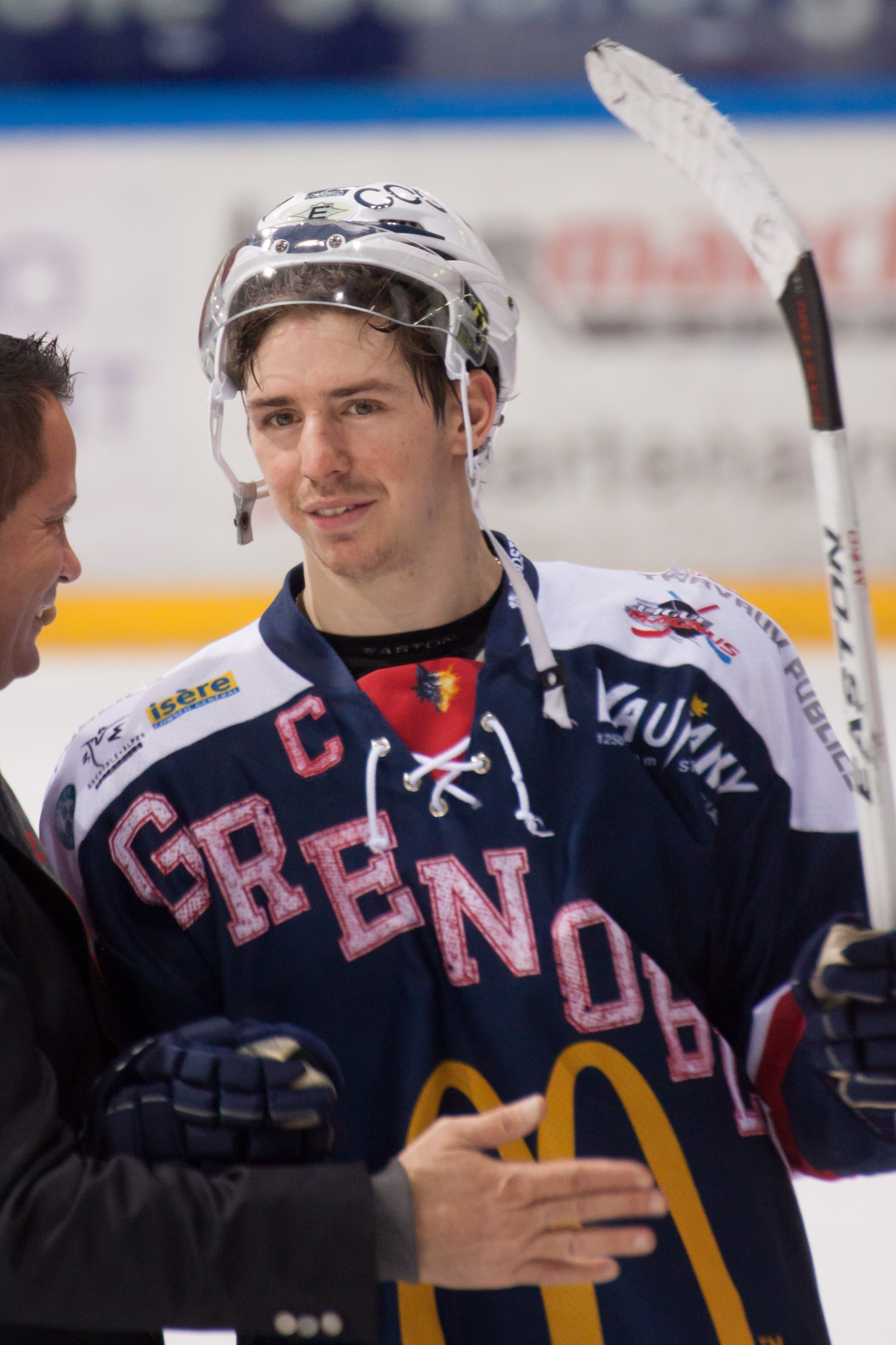 Julien Baylacq lors du match Grenoble-Epinal le 13 janvier 2013